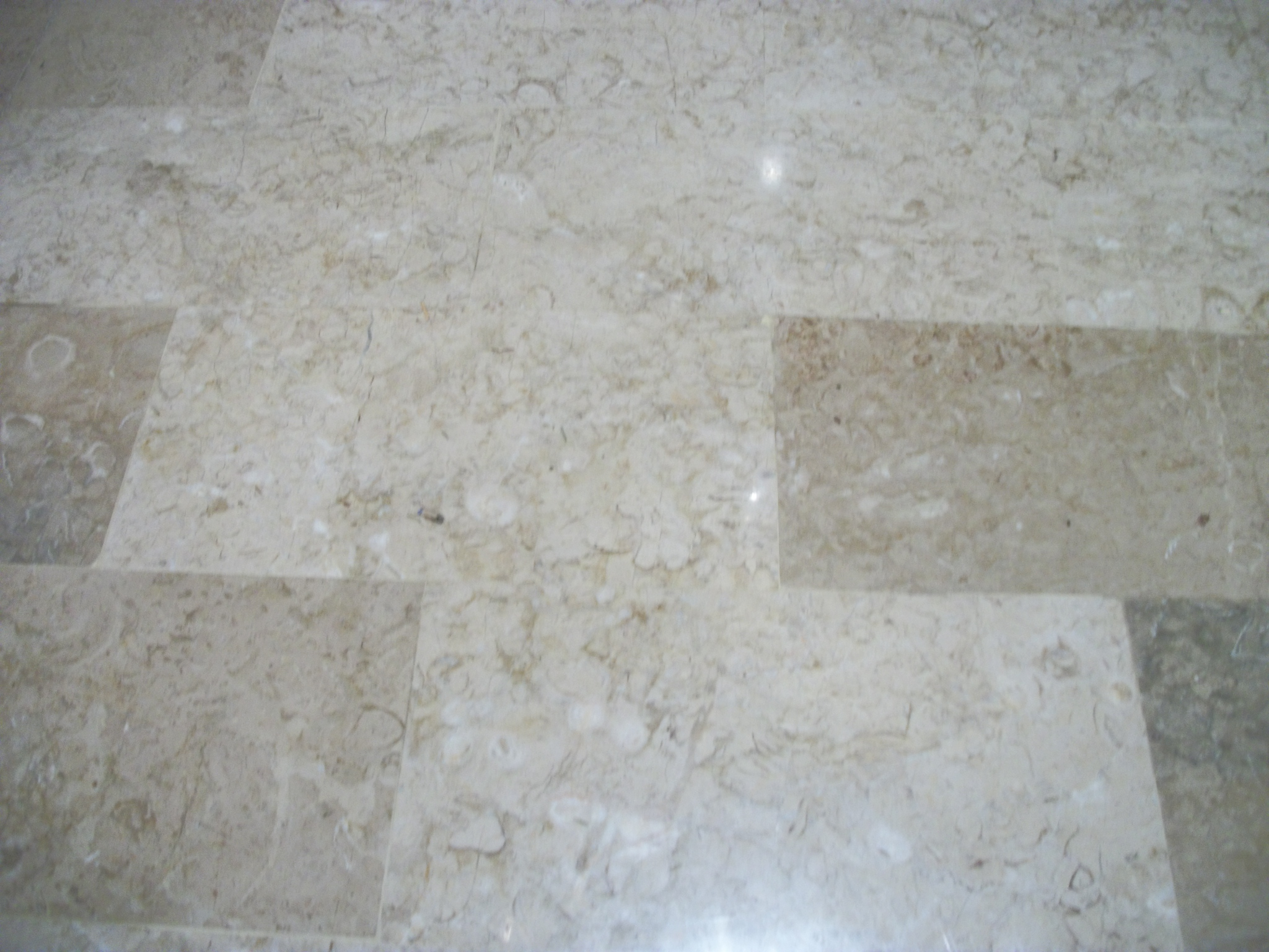 Église de la Nativité-de-la-Sainte-Vierge de Marignac